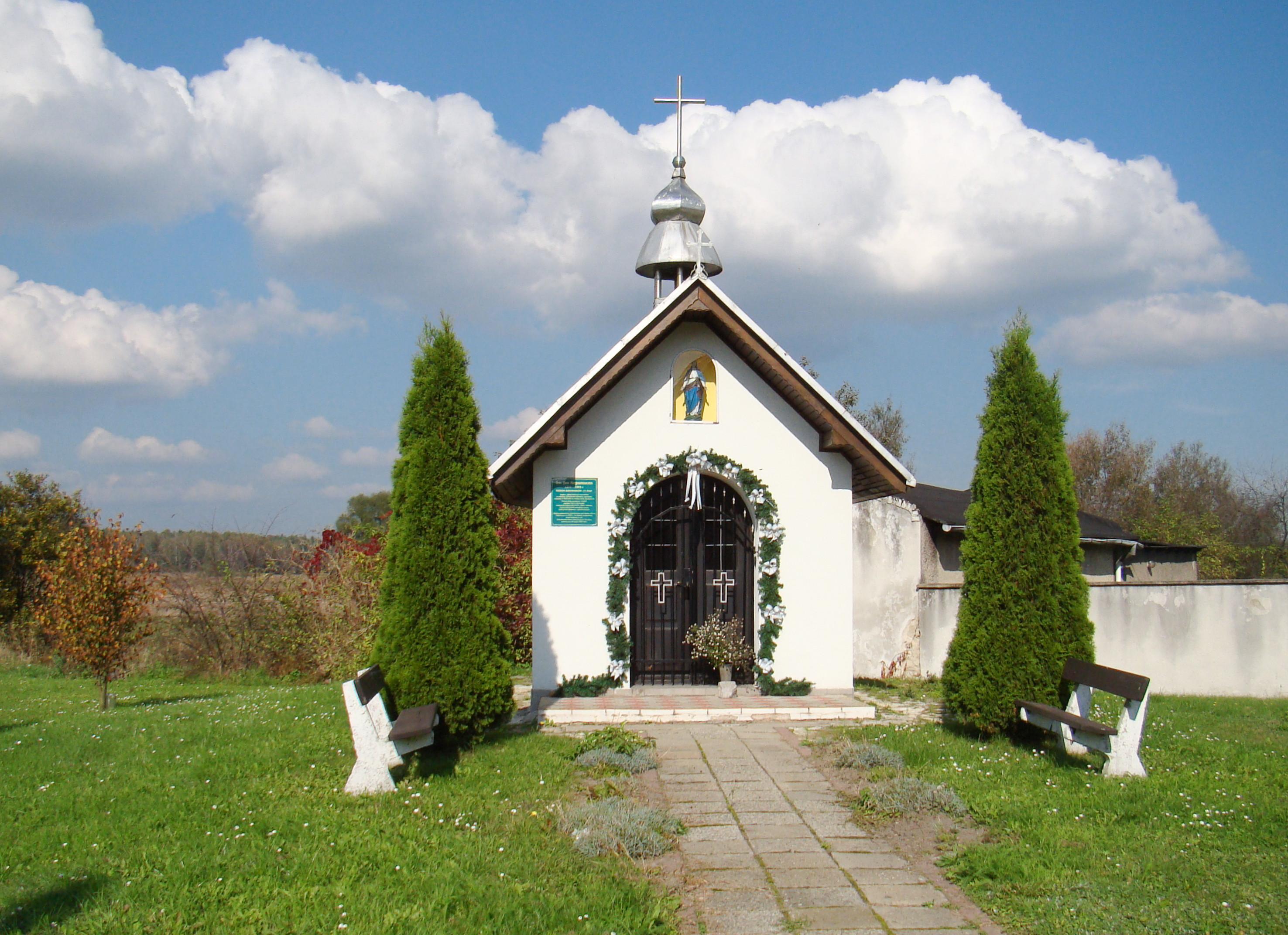 Kapliczka poświęcona Janowi Nepomucenowi.